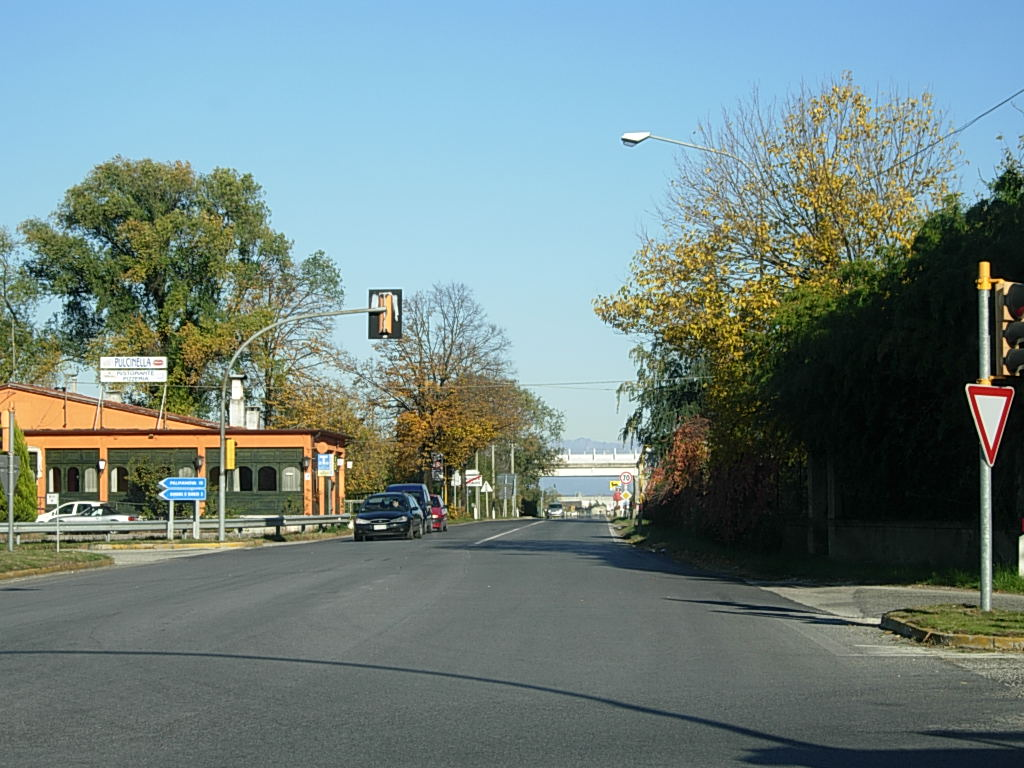 Strada regionale 305 a Gradisca d'Isonzo (GO) Foto personale concessa in PD